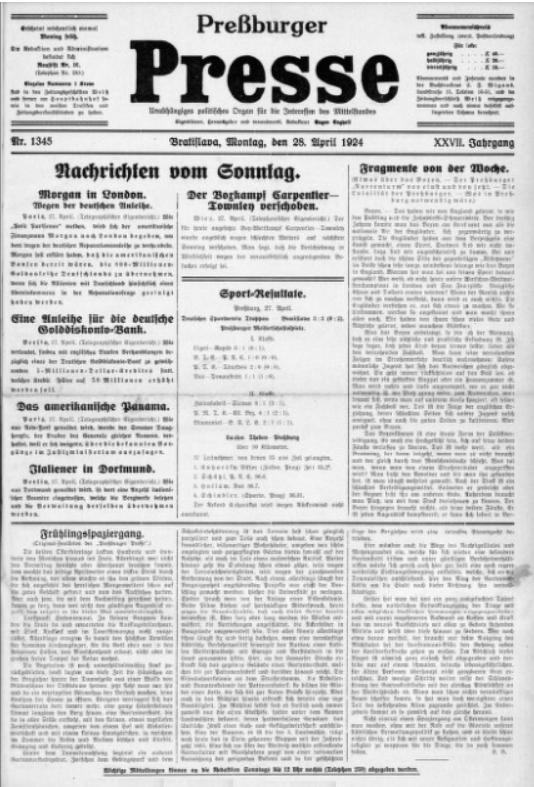 Pressburger Presse je nemecký politický týždenník pre mestskú problematiku Bratislavy, ktorý vychádzal od r. 1898 do 1918